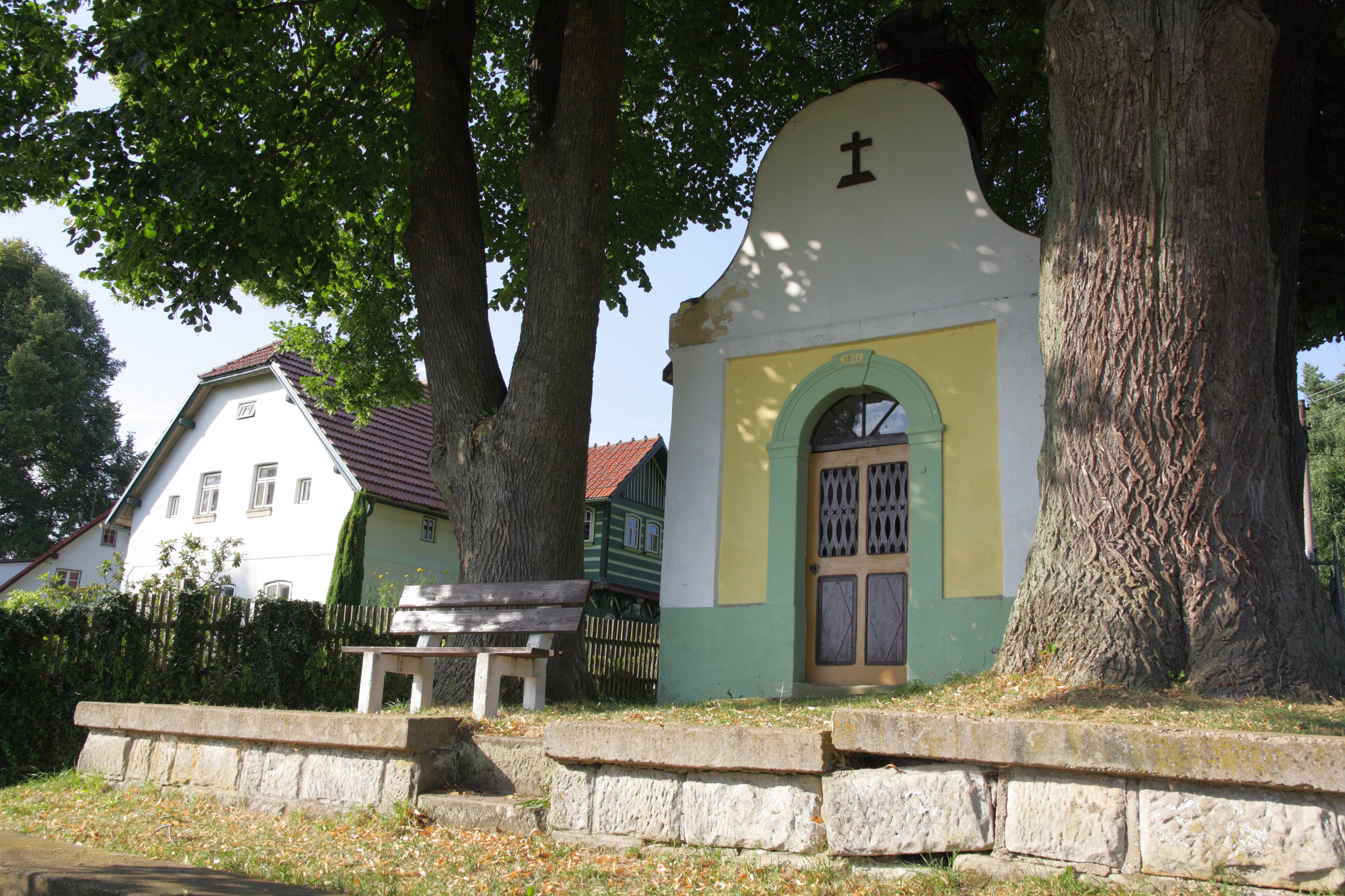 Ondříkovice - kaple Panny Marie z roku 1861.